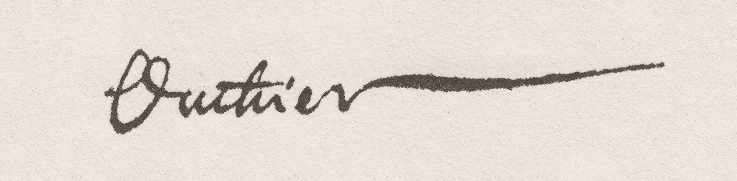 Signature d'Outhier sur une lettre adressée à Le Monnier